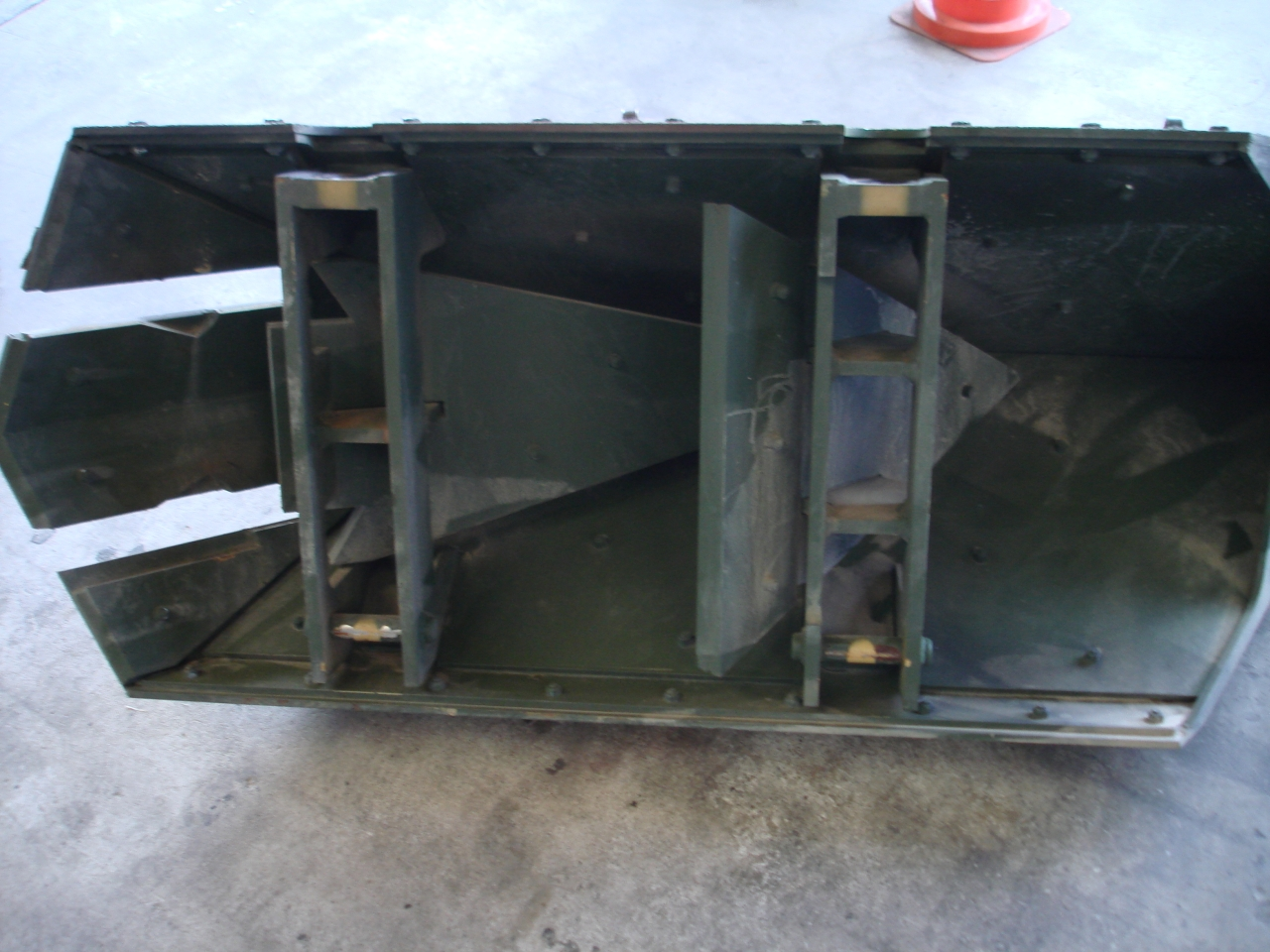 Abgenommene Keilpanzerung des Leopard 2A5